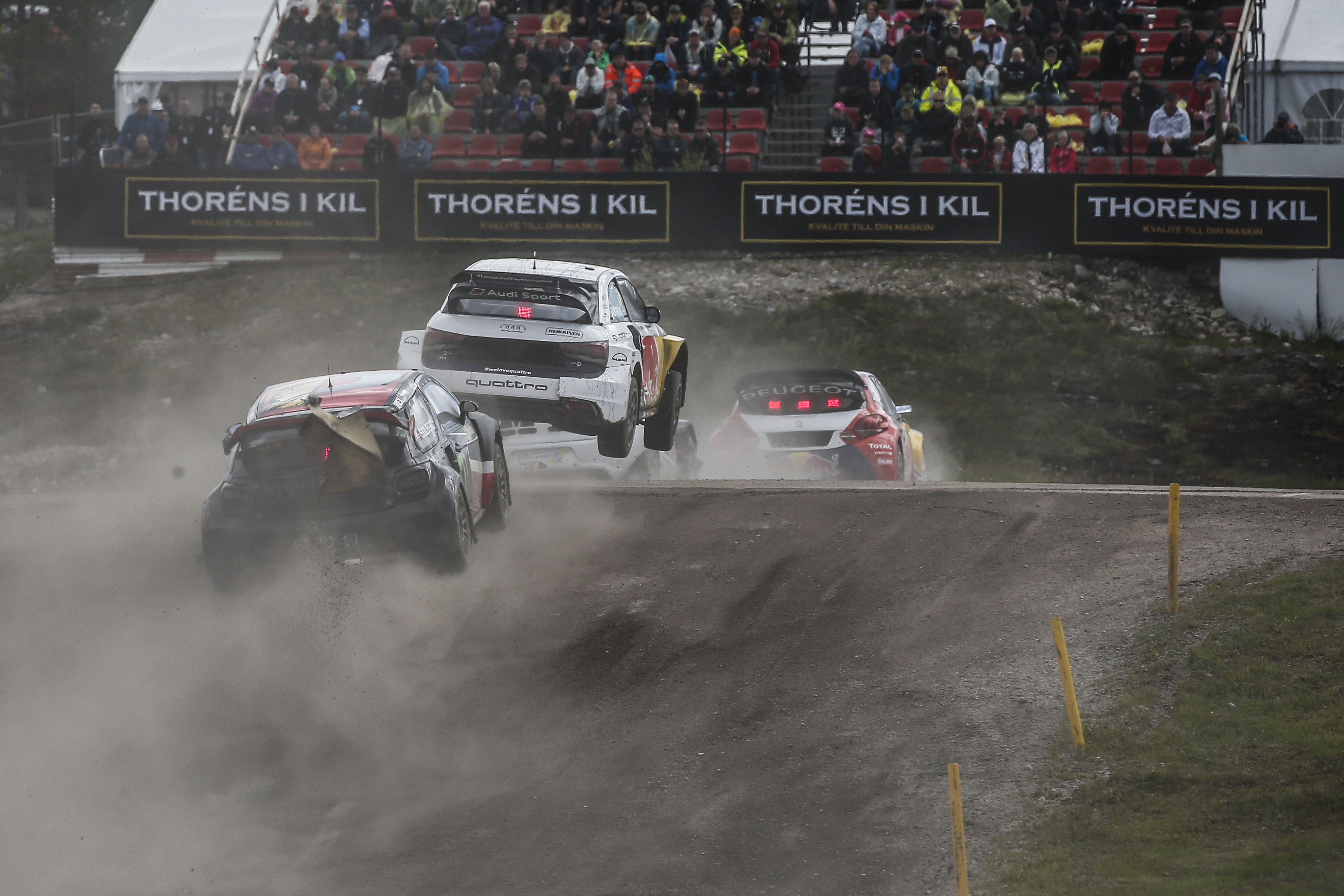 Mattias Ekström (Audi S1 EKS RX quattro)